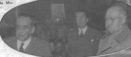 El Presidente Juan Esteban Montero a la izquierda, acompañado por su ministro Carlos Vergara Montero, a instantes de retirarse de la Moneda, en esos minutos se declara un nuevo gobierno